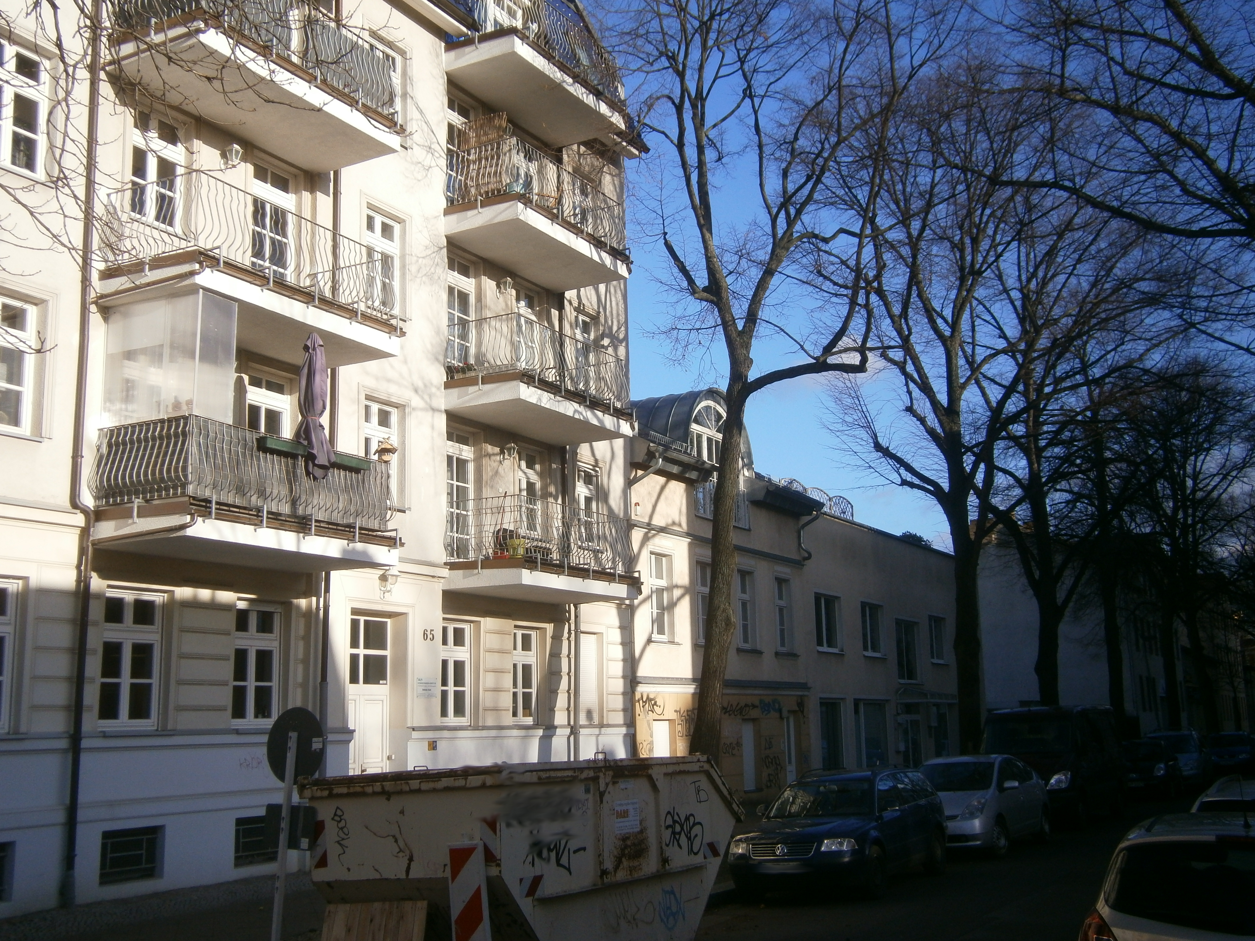 Die Charlottenburger Straße ist eine Straße im Berliner Ortsteil Weißensee, Ortslage Gründerviertel. Blick zur Nordseite der Straße in Höhe 65 nahe Jabsohnstraße, nach Osten..